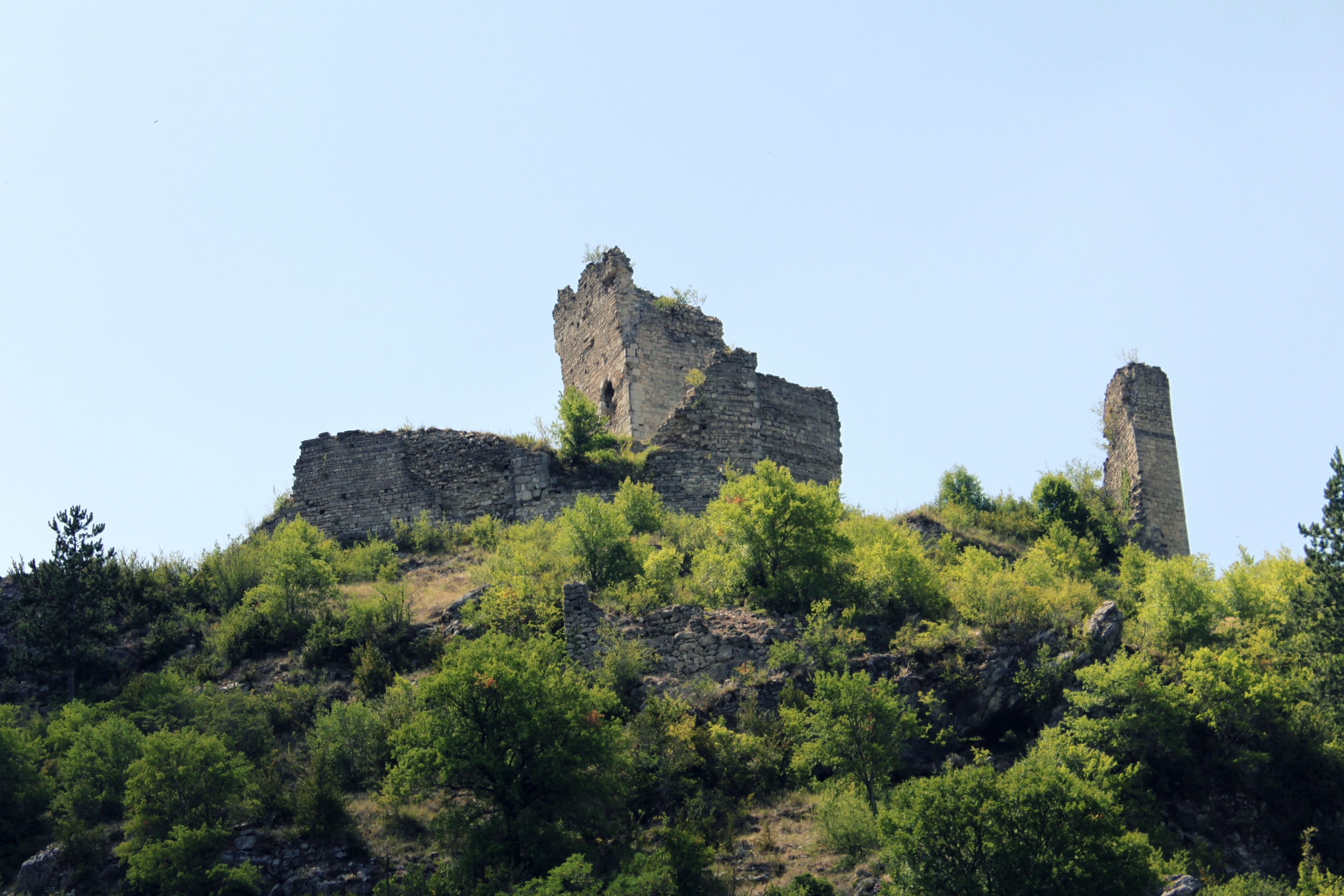 Les ruines du château de Pontaix.